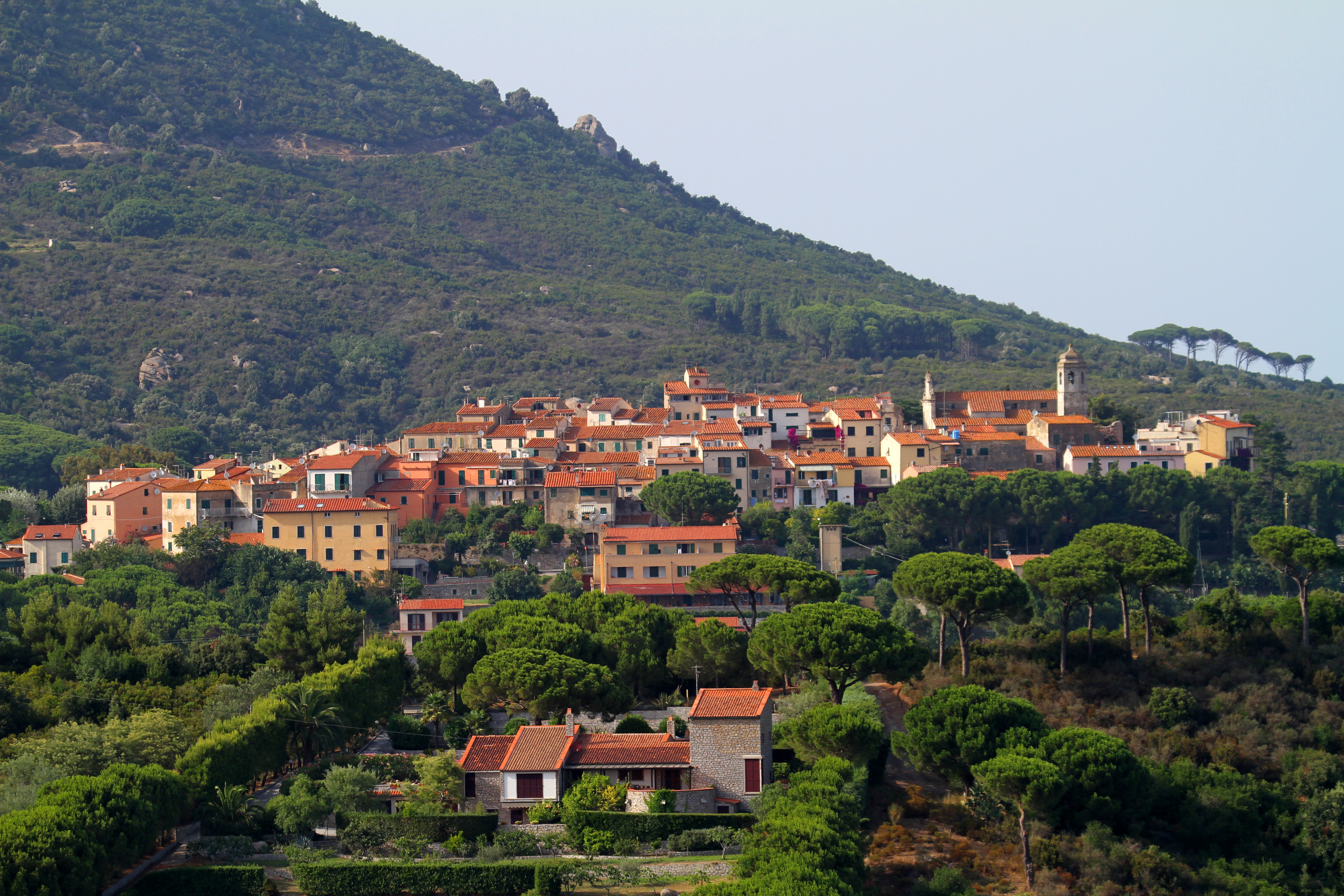 Sant'Ilario, visto da San Piero in Campo